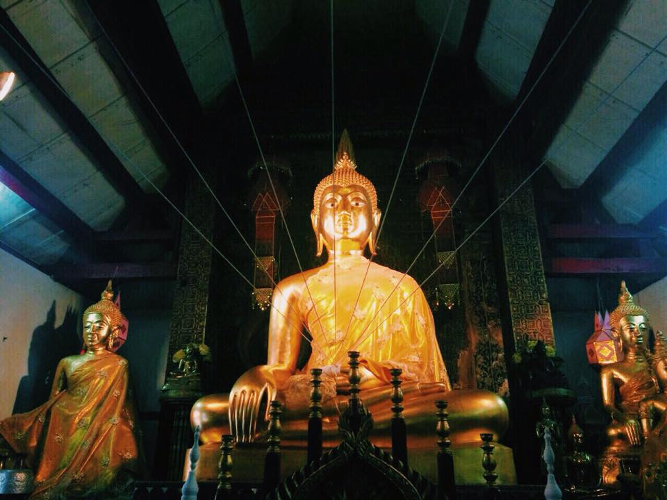 พระประธานในพระวิหารวัดป่าแดง